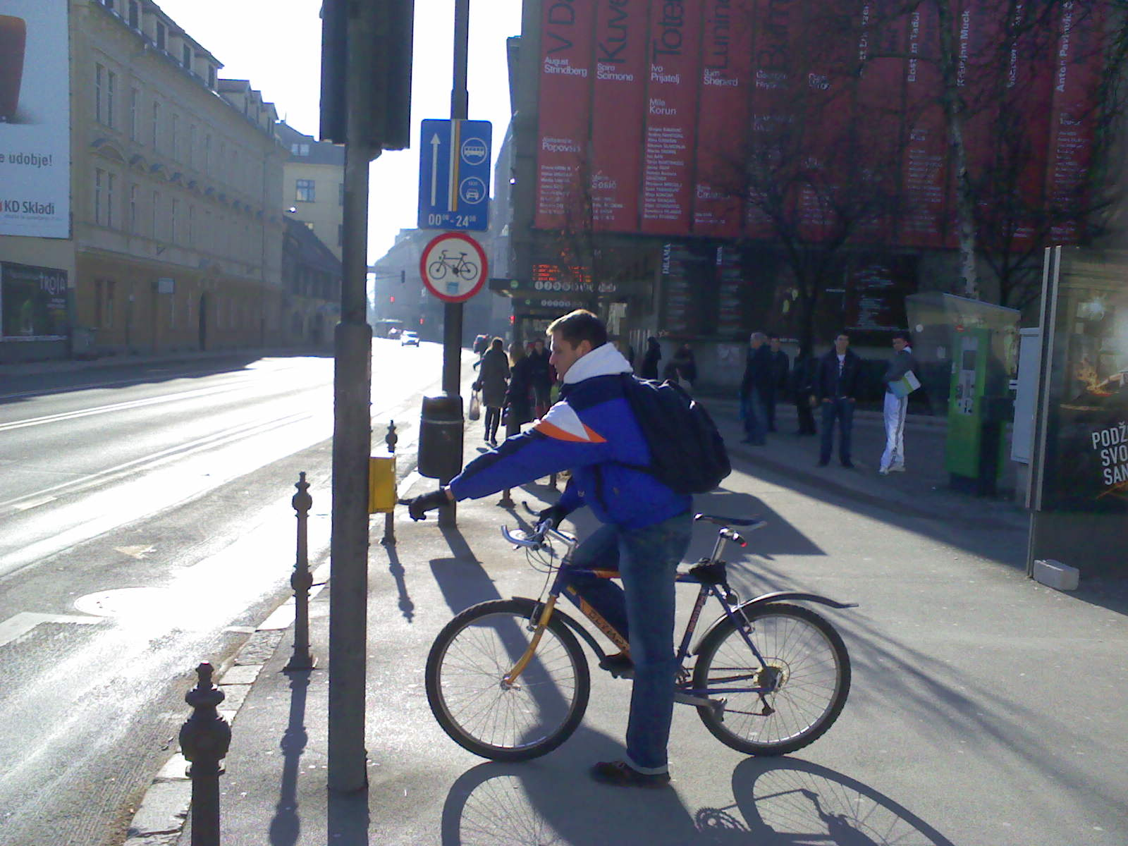 Slovenska cesta v Ljubljani: kolesarjenje je prepovedano